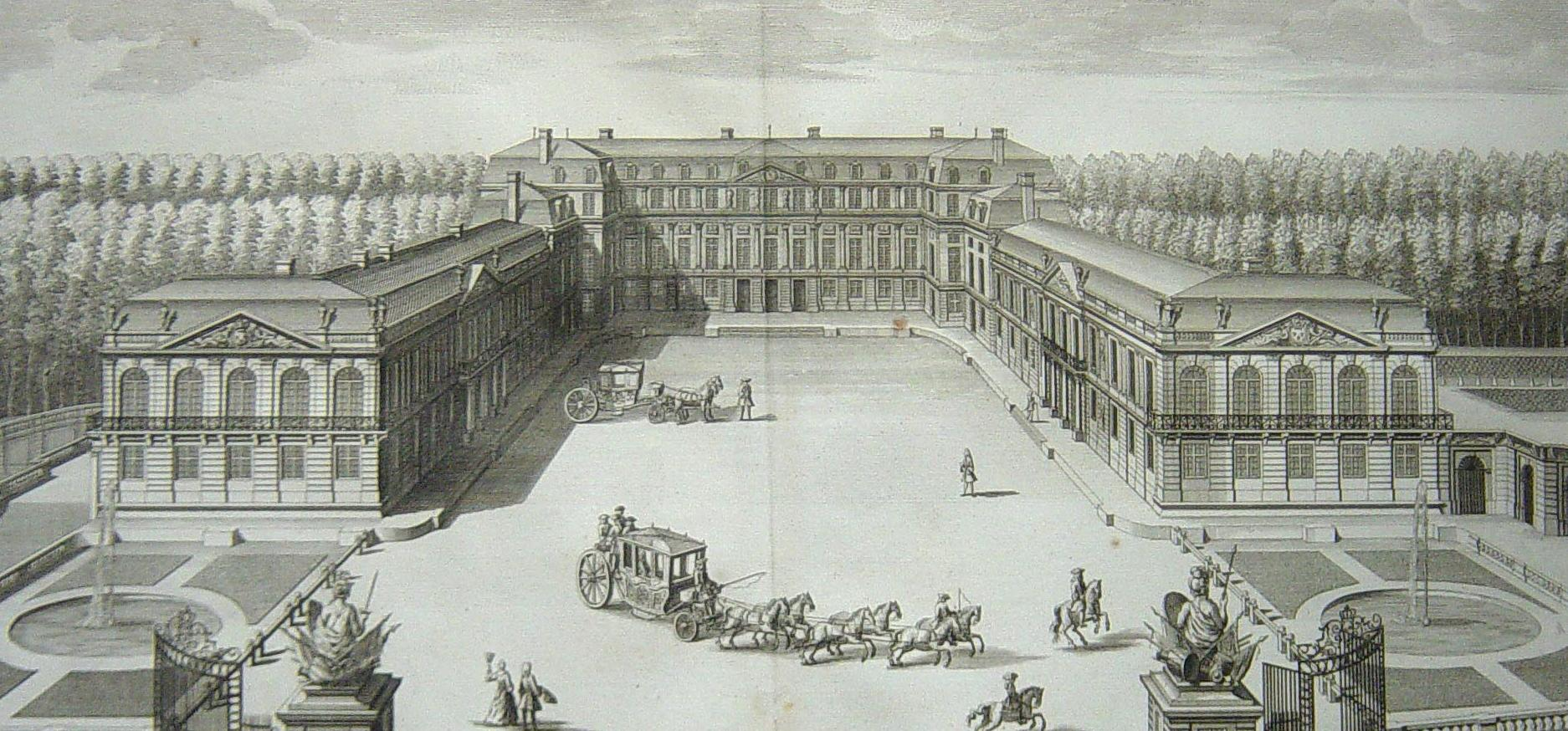 Vue du château de Saint-Cloud au XVII° siècle, dessin anonyme du XVII° siècle